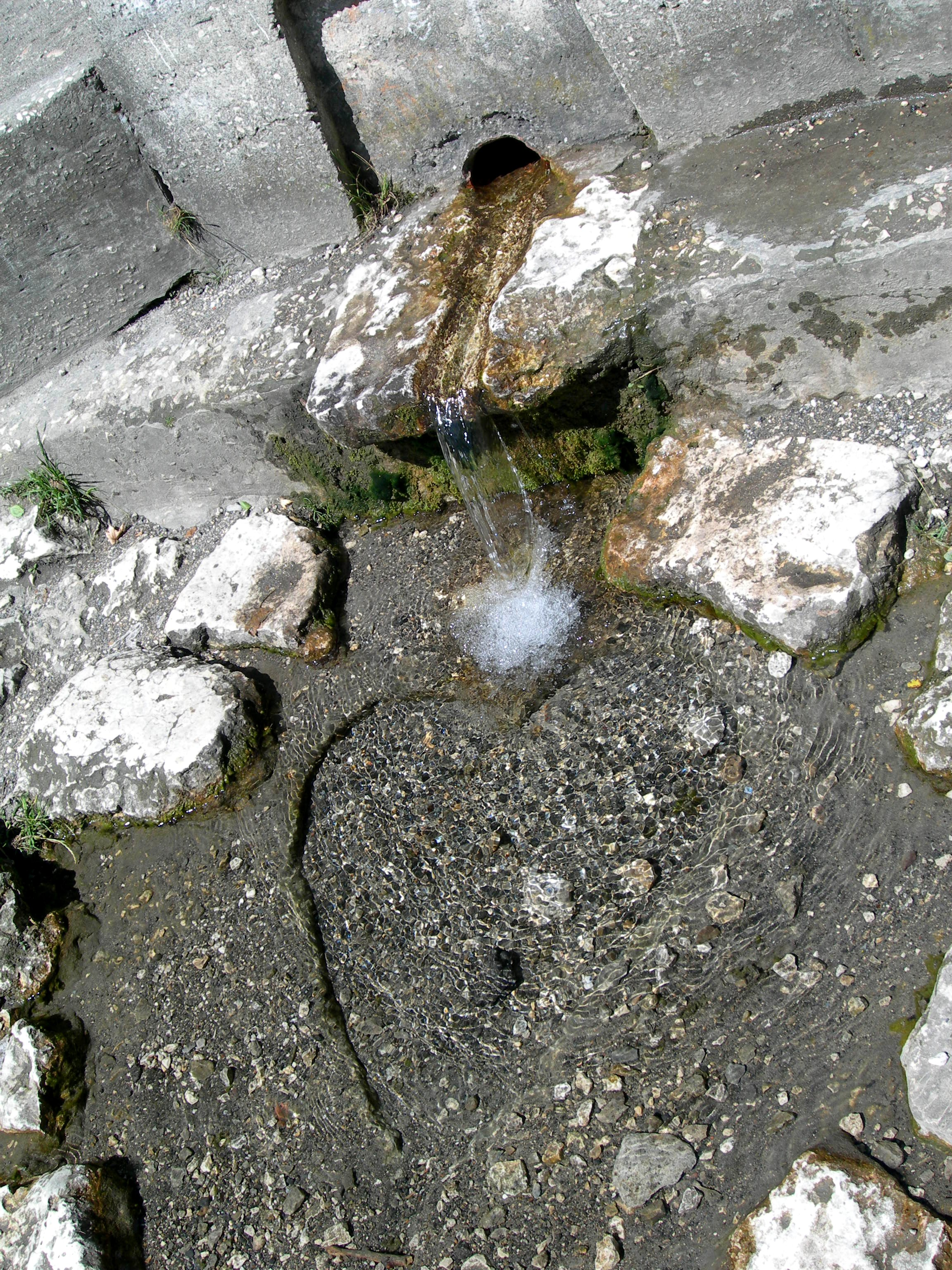 Źródełko Miłości w Ojcowskim Parku Narodowym